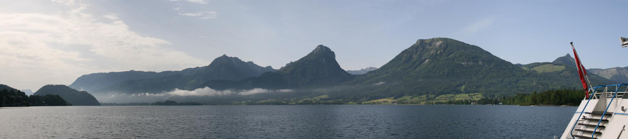 Panoramaaufnahme des Wolfgangsees. Fotografiert nahe der Bootsanlegestelle der Wolgangseeschifffahrt.